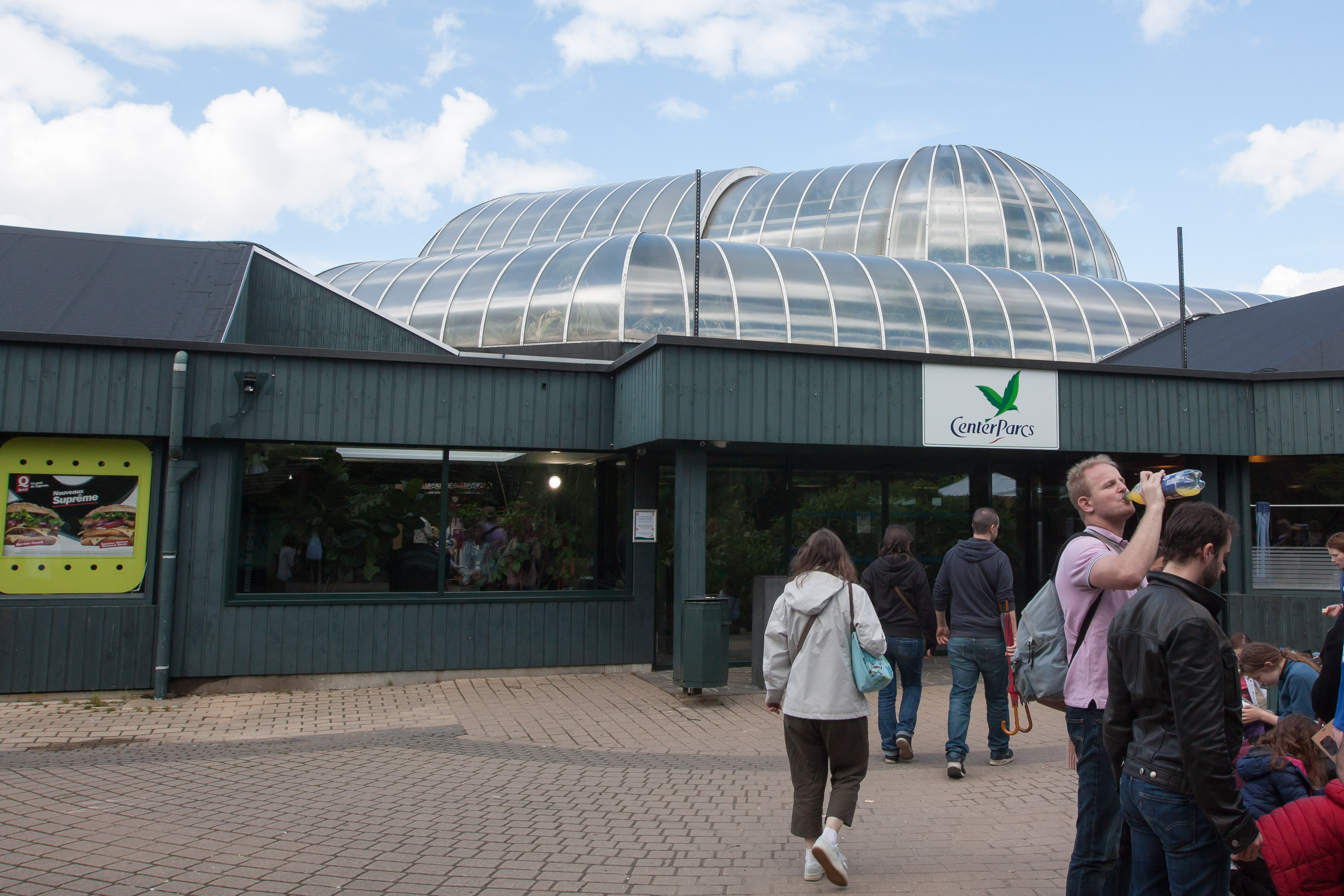 Vue extérieure du "Dôme" du Center Parcs "Les Bois- Francs" (Les Barils, Eure, Normandie, France )